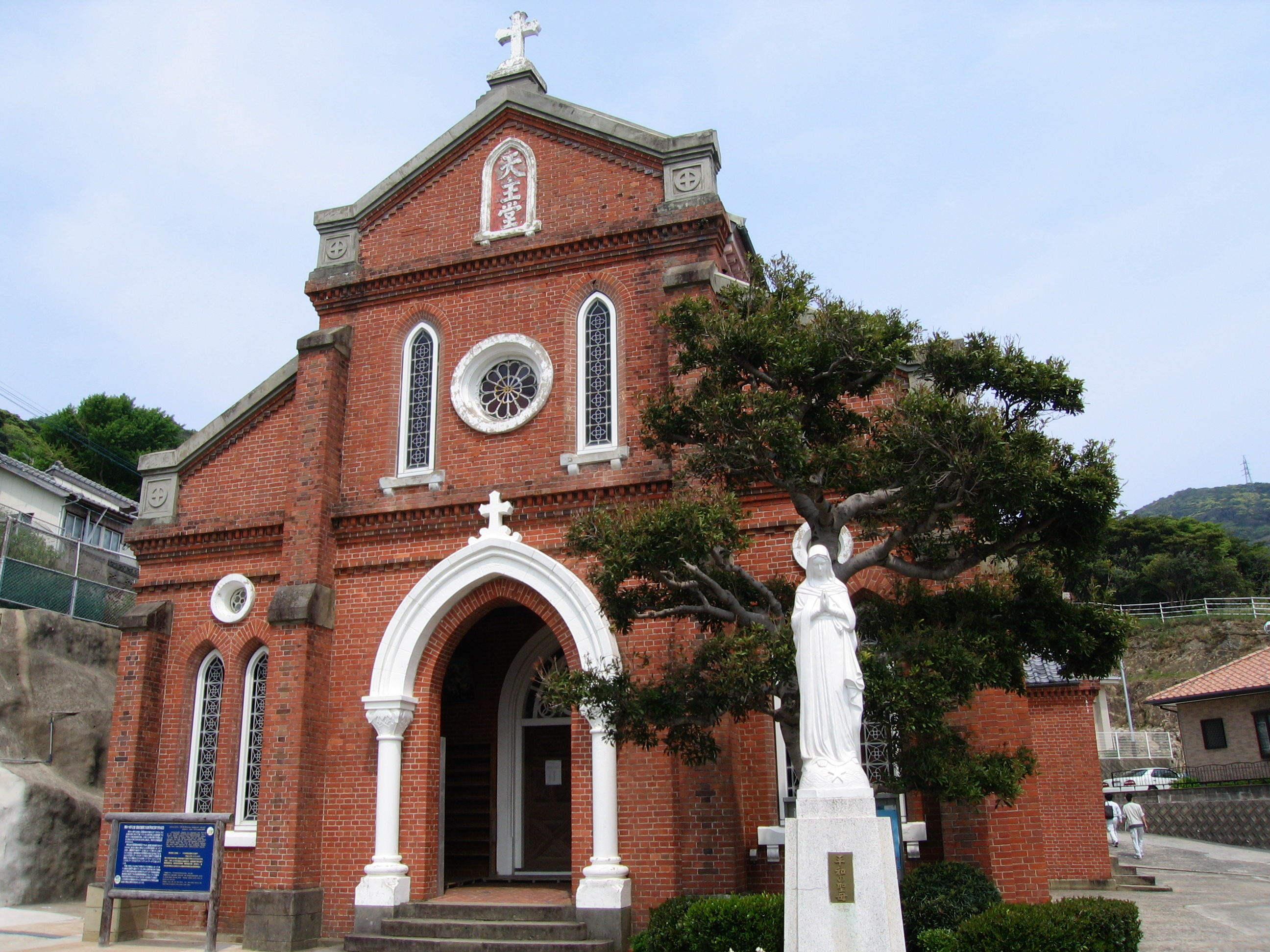 Aosagaura Church(青砂ヶ浦教会) in Shinkamigoto, Nagasaki, Japan